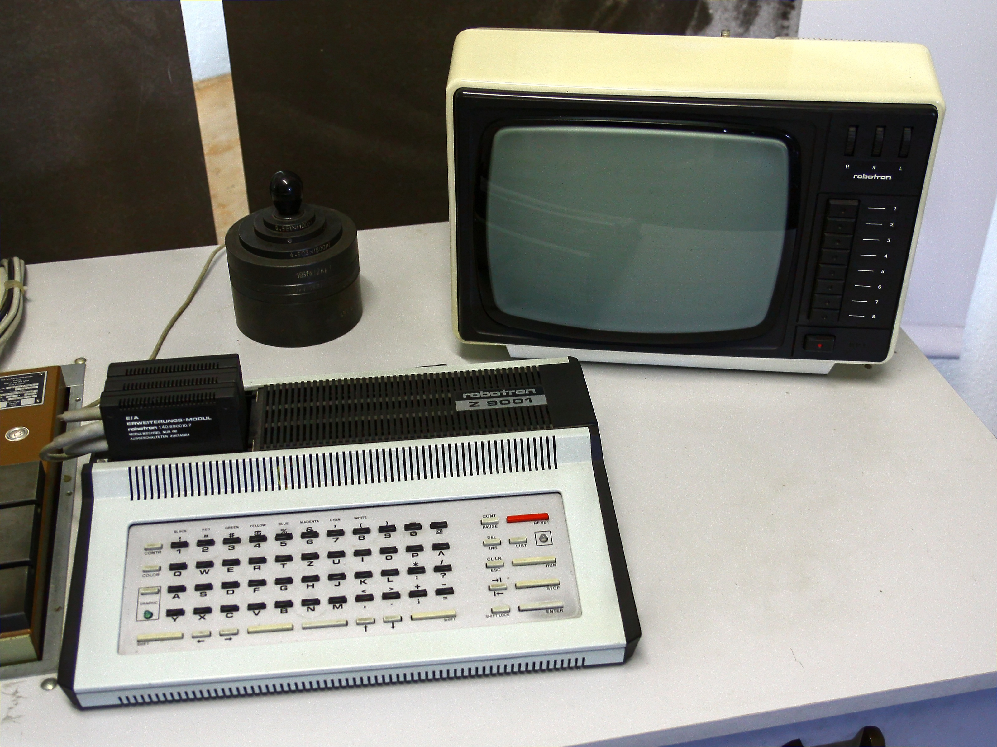 DDR-Museum Zeitreise in Radebeul 2012 - Heimcomputer Robotron Z9001 vom VEB Kombinat Robotron von 1983/1984